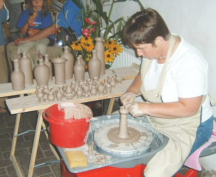 Frau beim Töpfern, woman making pottery, la potière façonne l'objet